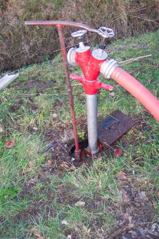 Description Ondergrondse brandkraan met opzetstuk, sleutel en een aangesloten brandslang. Date14 January 2007SourceSelf-photographedAuthorEdBeverPermission (Reusing this file) eigen werk, GFDL Ondergrondse brandkraan met opzetstuk, sleutel en een aangesloten brandslang.